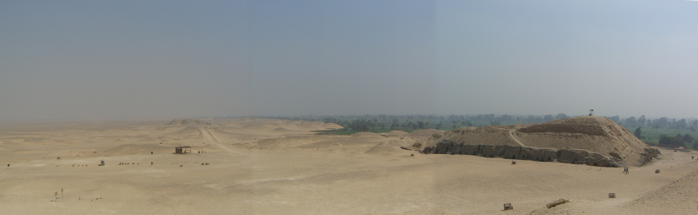 Panorama de la nécropole de Meïdoum - IVe dynastie égyptienne